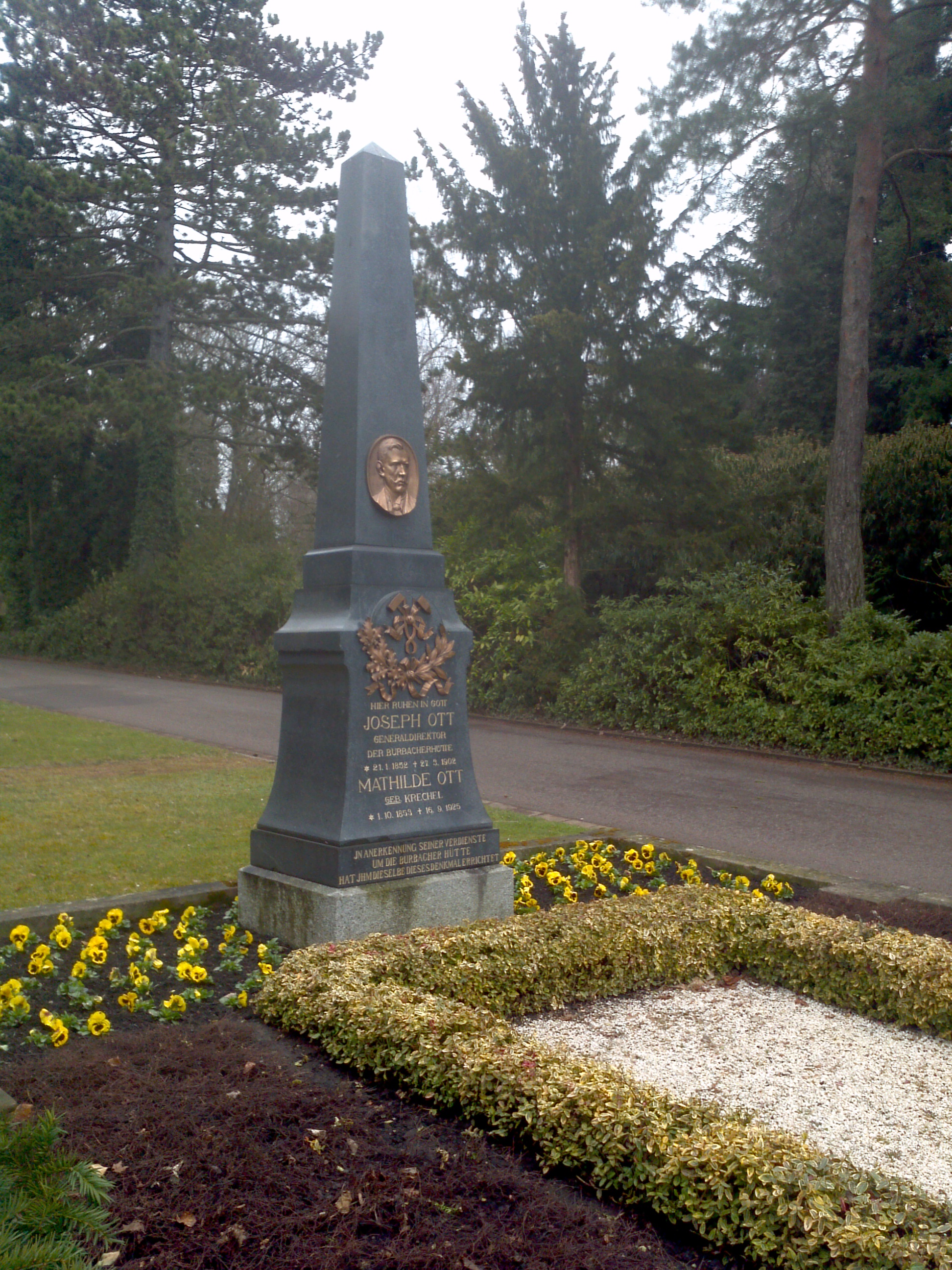 Grabmal Joseph Ott auf dem Waldfriedhof Burbach